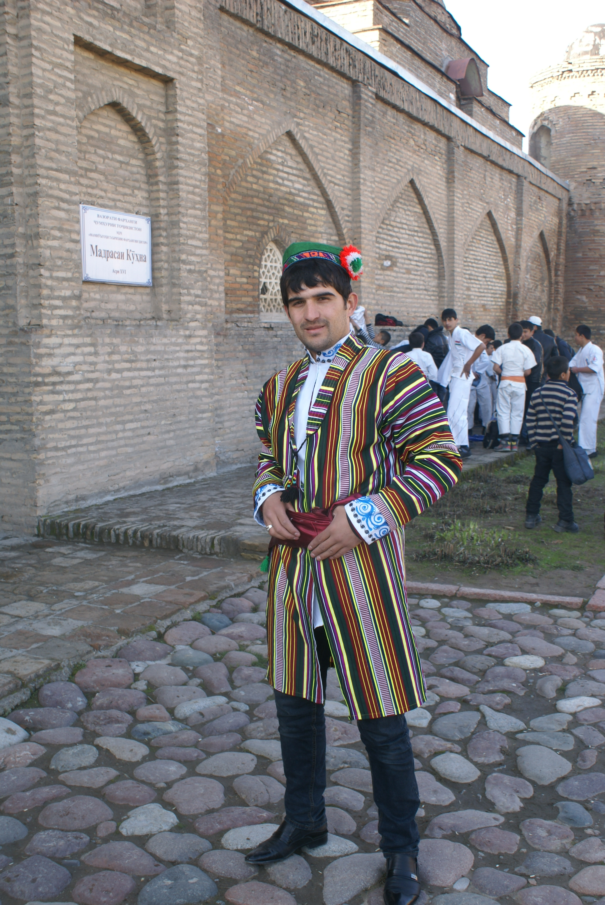 Тоҷикӣ: Сару либоси миллӣ (Ҳиссор, Тоҷикистон)